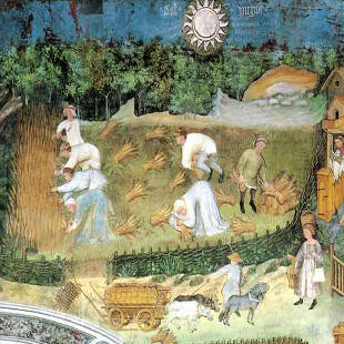 Ciclo dei mesi, raccolto, agosto